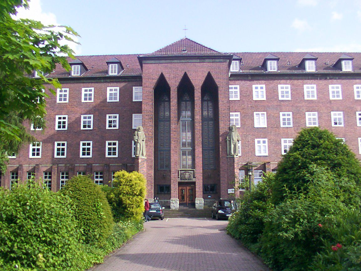 Paderborn: Katholische Fachhochschule (Priesterseminar) This is a photograph of an architectural monument.